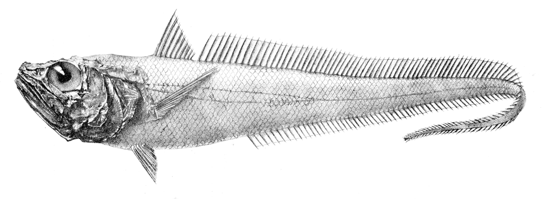 Bathygadus melanobranchus